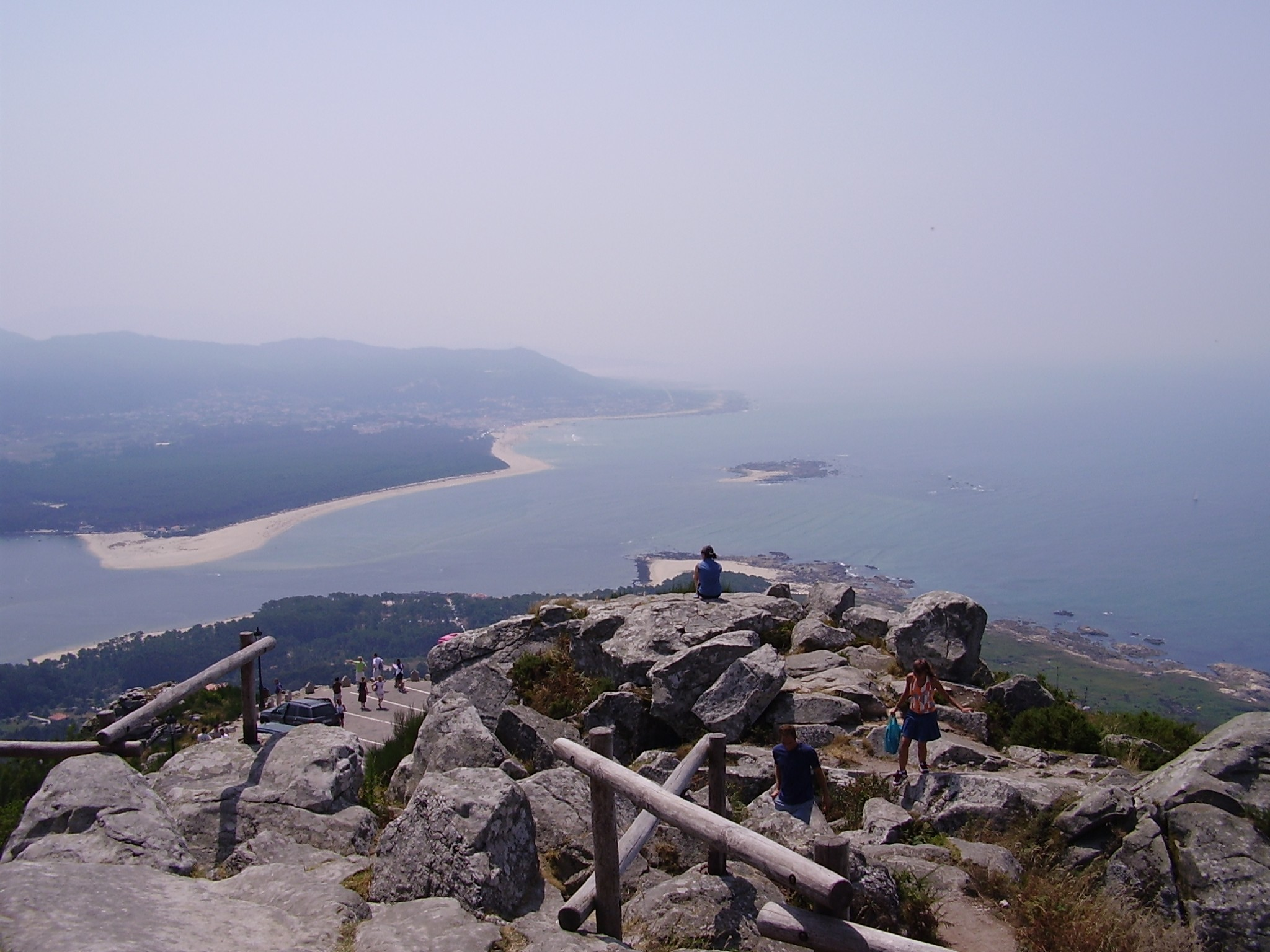 Monte de Santa Tecla (Santa Trega en gallego), La Guardia (Pontevedra)